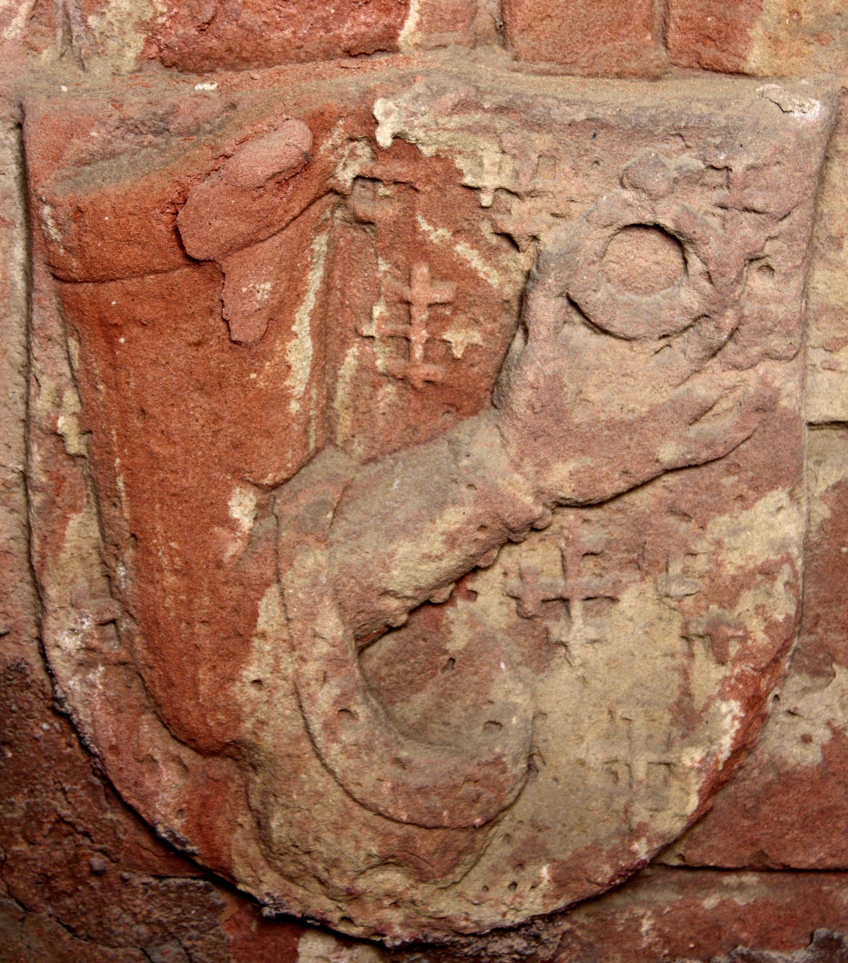 Ahnenprobe des Wappens der Ritter von Lösnich auf der Grabplatte des Ritters Cuno VI. von Pirmont 1447